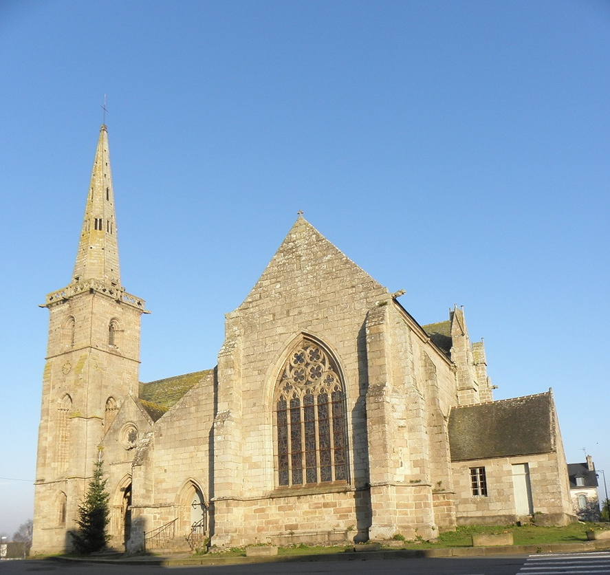 Flanc sud de l'église Sainte-Catherine de La Roche-Derrien (22). .